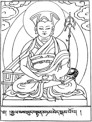 Гампопа